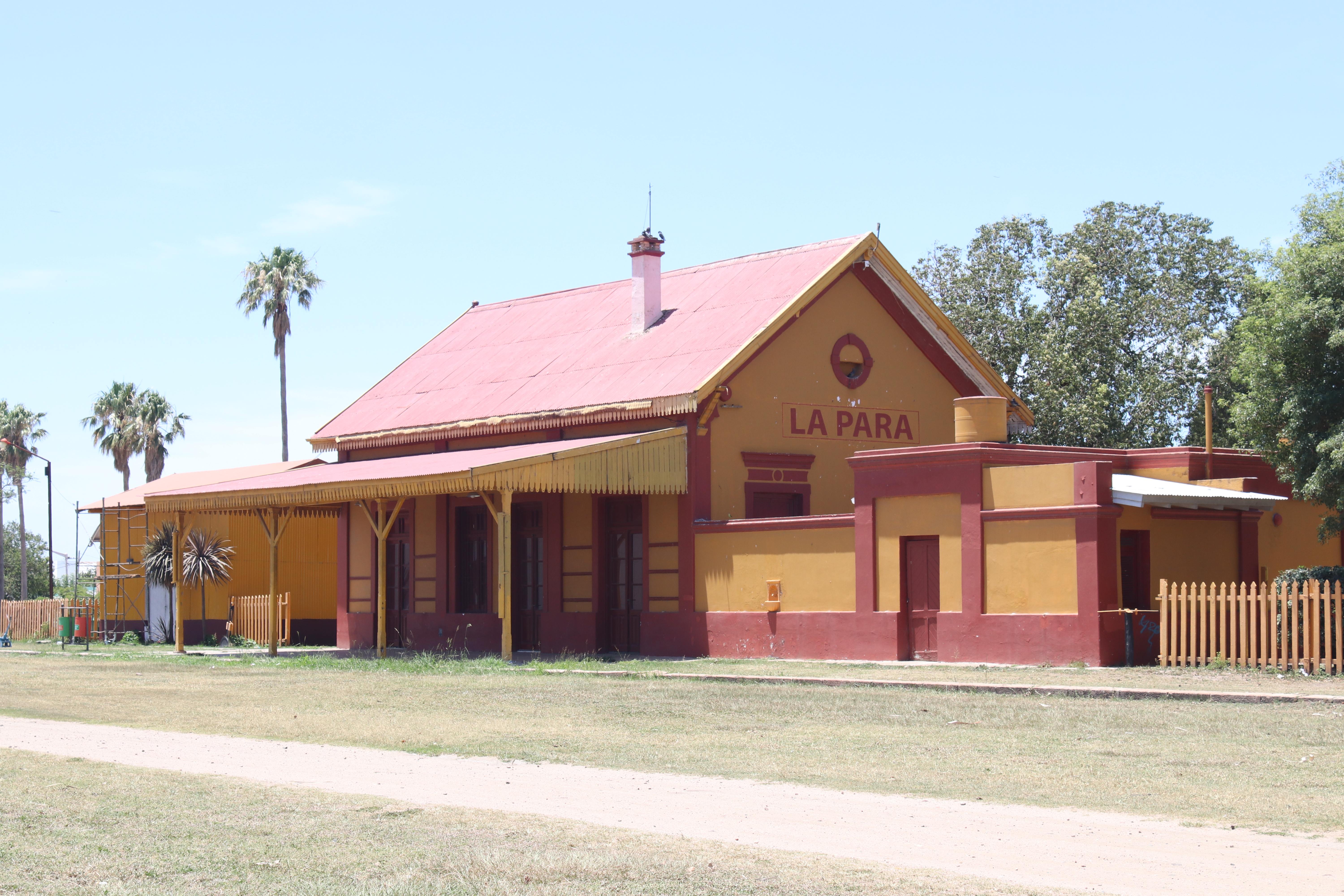 La Para